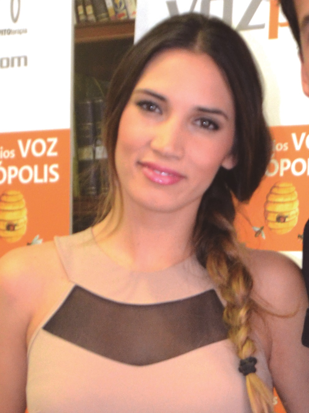 India Martínez (artista)